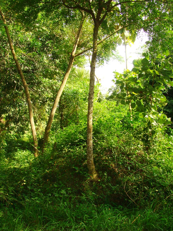 প্রীতিলতার জন্মস্থানের ধ্বংশাবশেষ। ভিটা বাড়ীর কোন চিহ্নই আর অবশিষ্ট নেই।